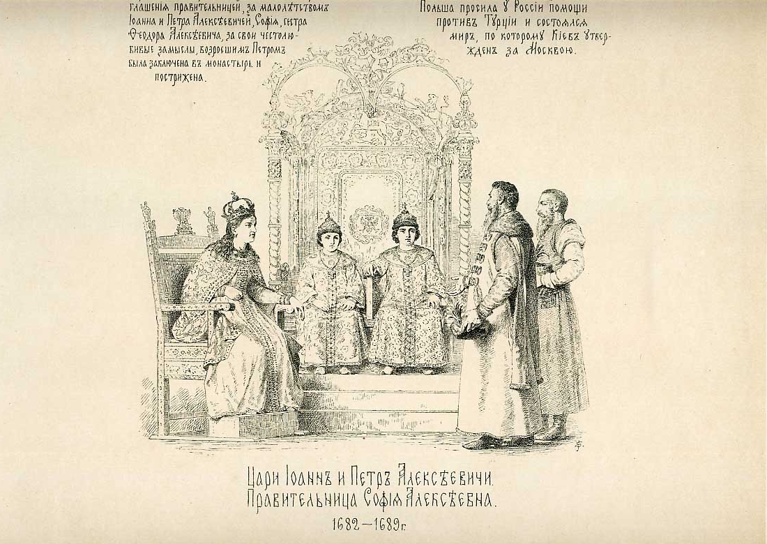 Цари Иоанн и Петр Алексеевичи, Правительница София Алексеевна. 1682-1689 г.